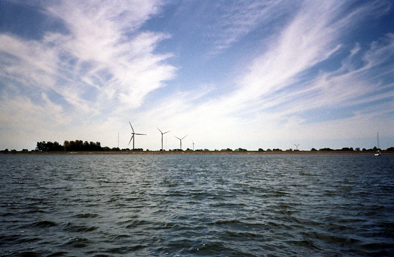 Het IJsselmeer bij Medemblik, Nederland